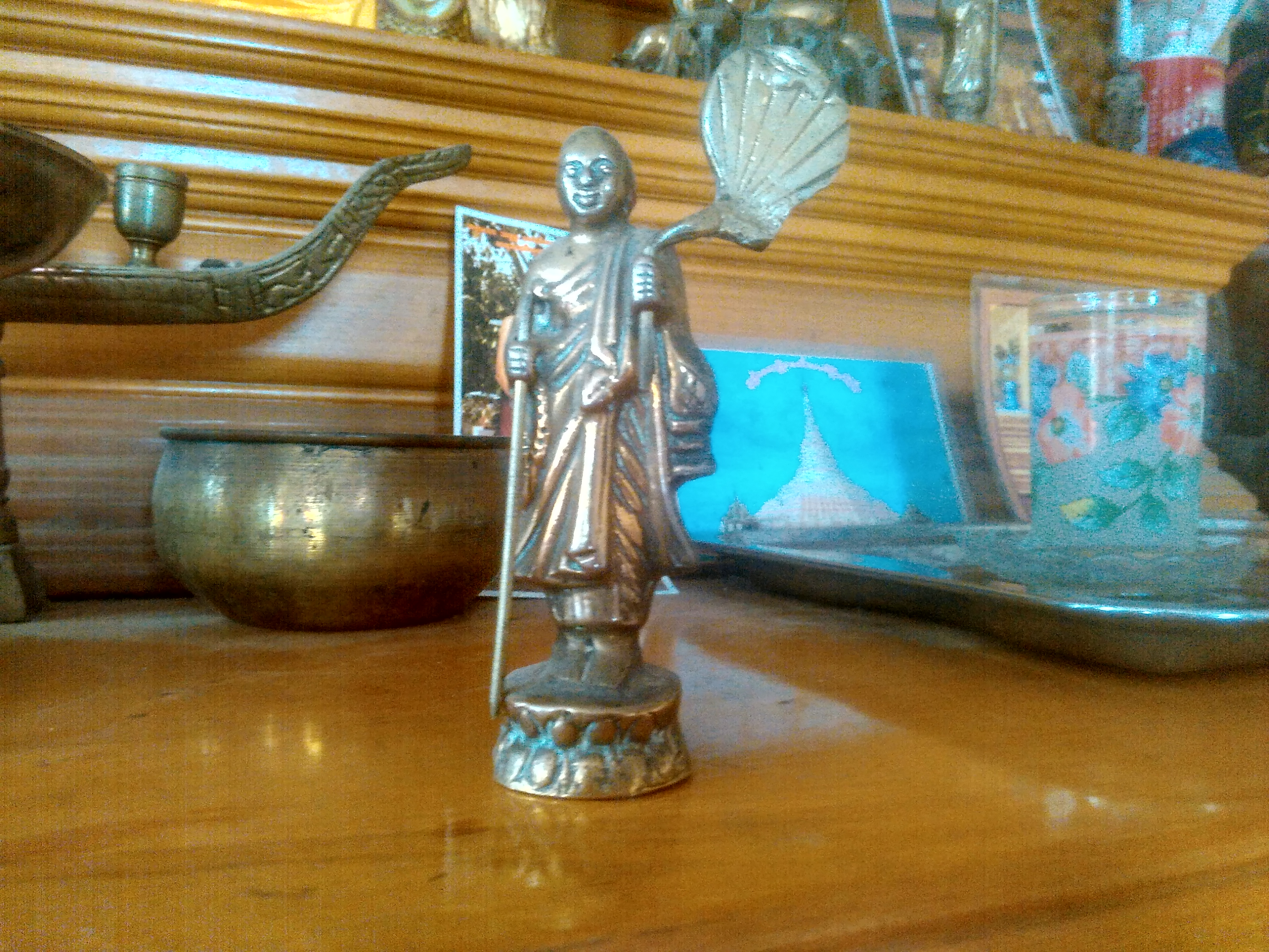 မြန်မာဘာသာ: ရဟန္တာရုပ်တု ဖြစ်သည်‌။ ကြေးဖြင့် ပြုလုပ်ထားသည်။